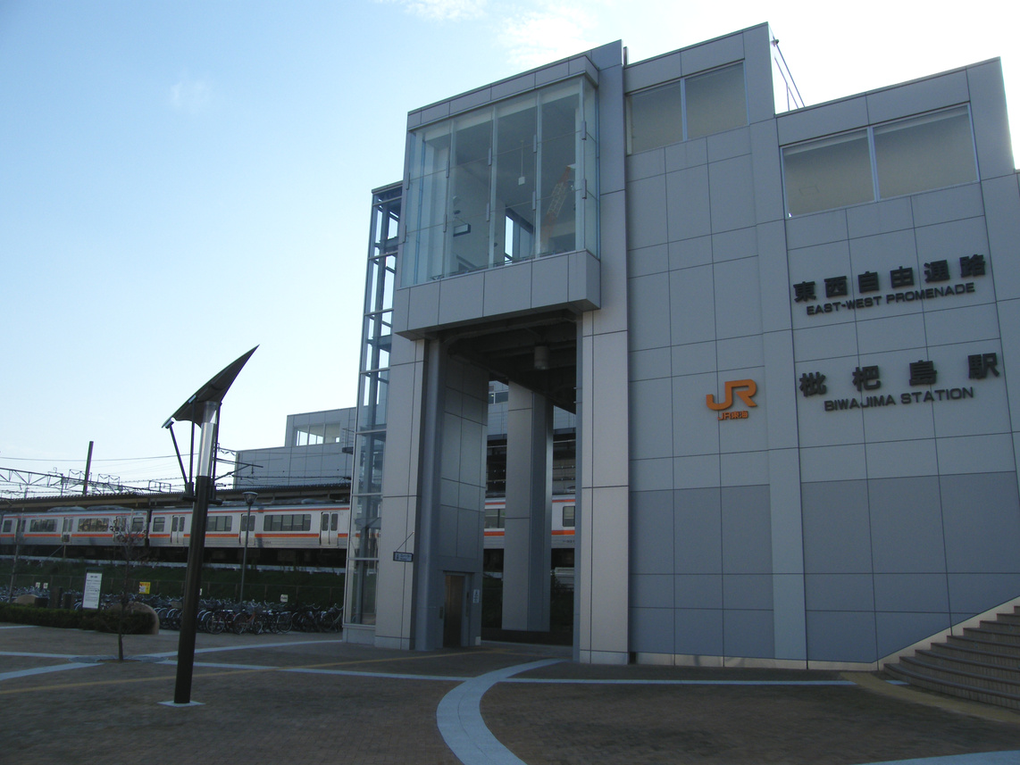 駅舎（東口）